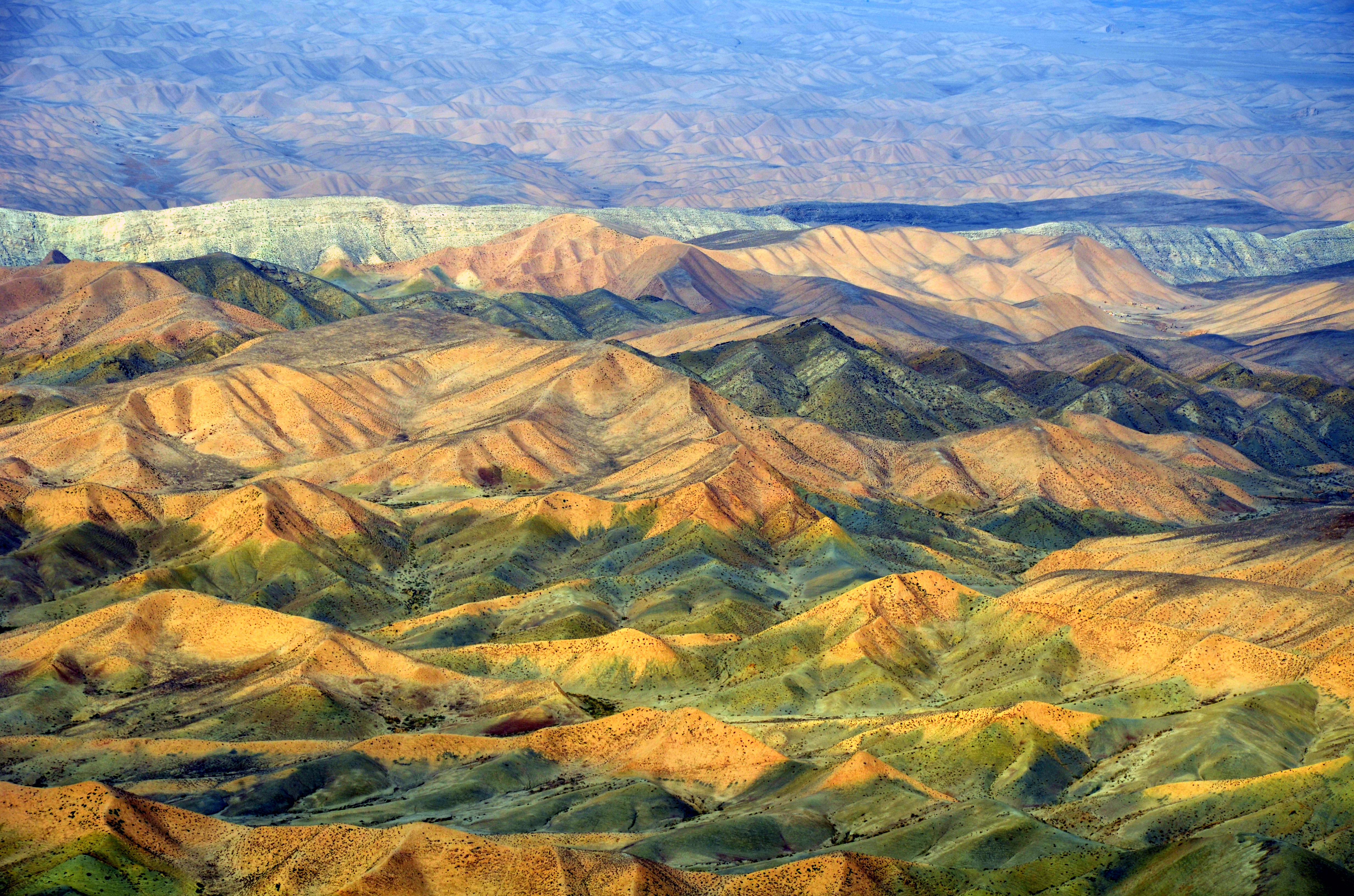 Iran - Golestan - Turkaman Sahra